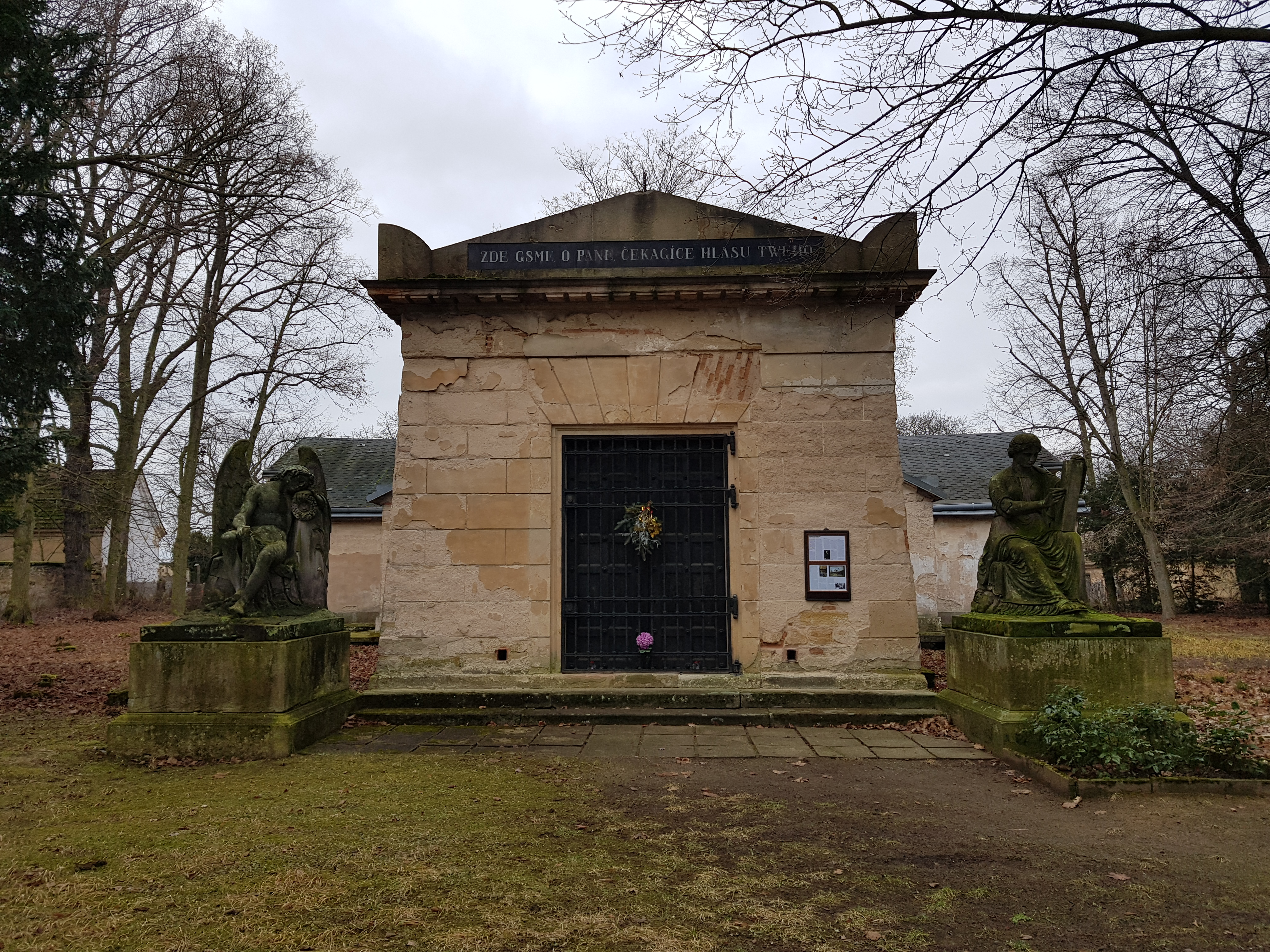 Hrobka Kinských v Budenicích, východní strana hrobky, vstup a sochy Thanatos (vlevo) a Historie (vpravo)